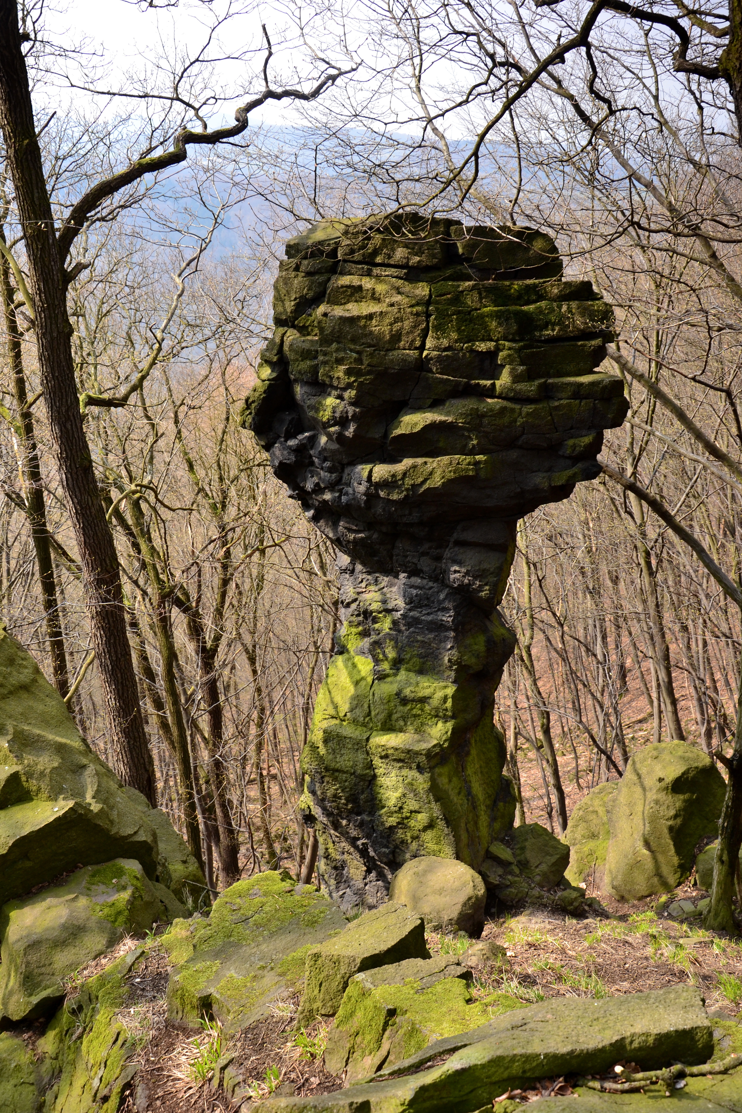 Skály na okraji chráněného území